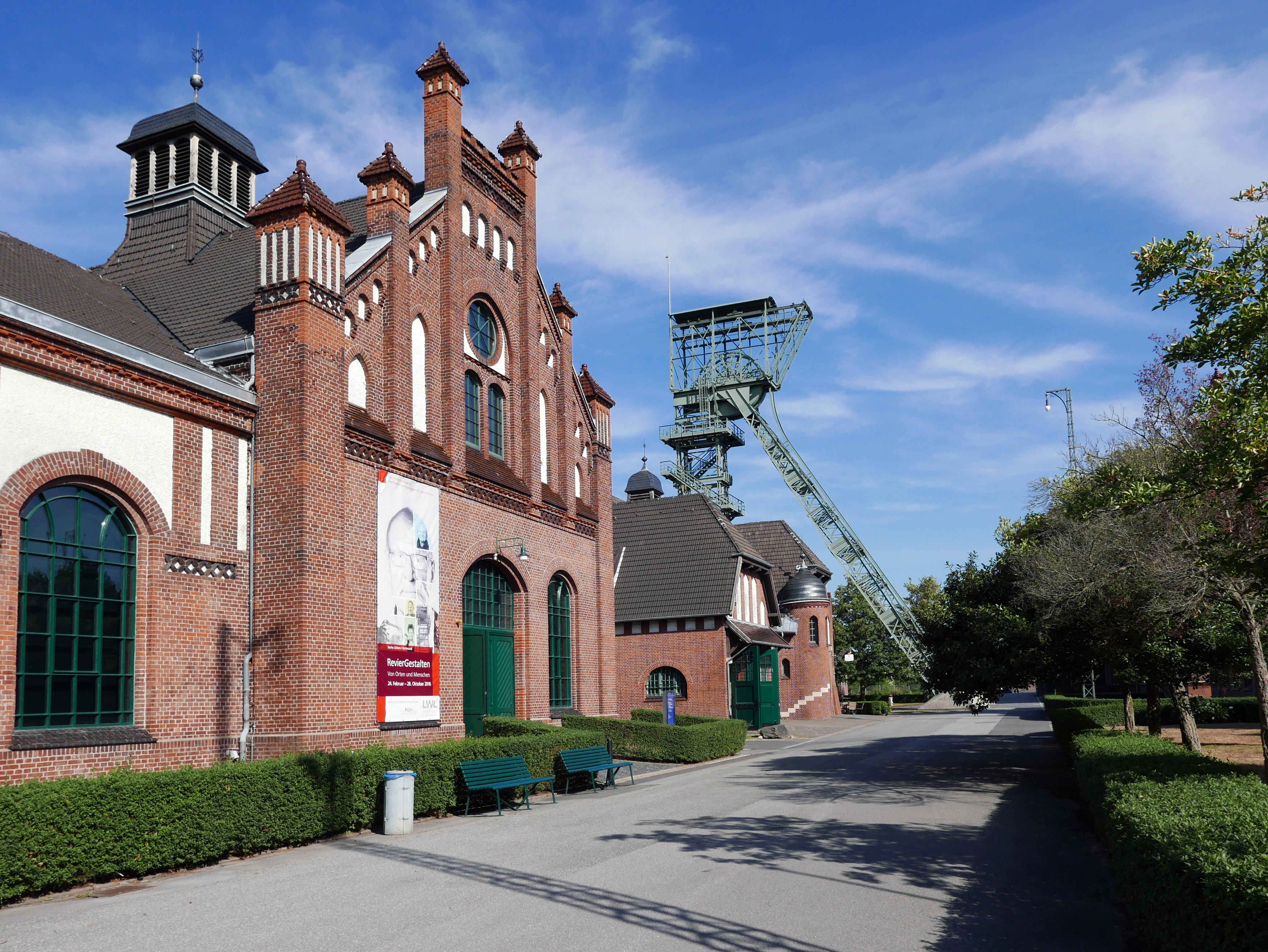 Besuch der Zeche Zollern: Ruhrgebietsstammtisch August 2018This is a photograph of an architectural monument., no. A 0373